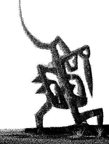 Monumento Solarius, vulgo "Chifrudo", na saída do DF em direção a Valparaíso, via BR-040, junto à entrada do acesso para o Córrego Saia Velha (editado para ressaltar a silhueta)